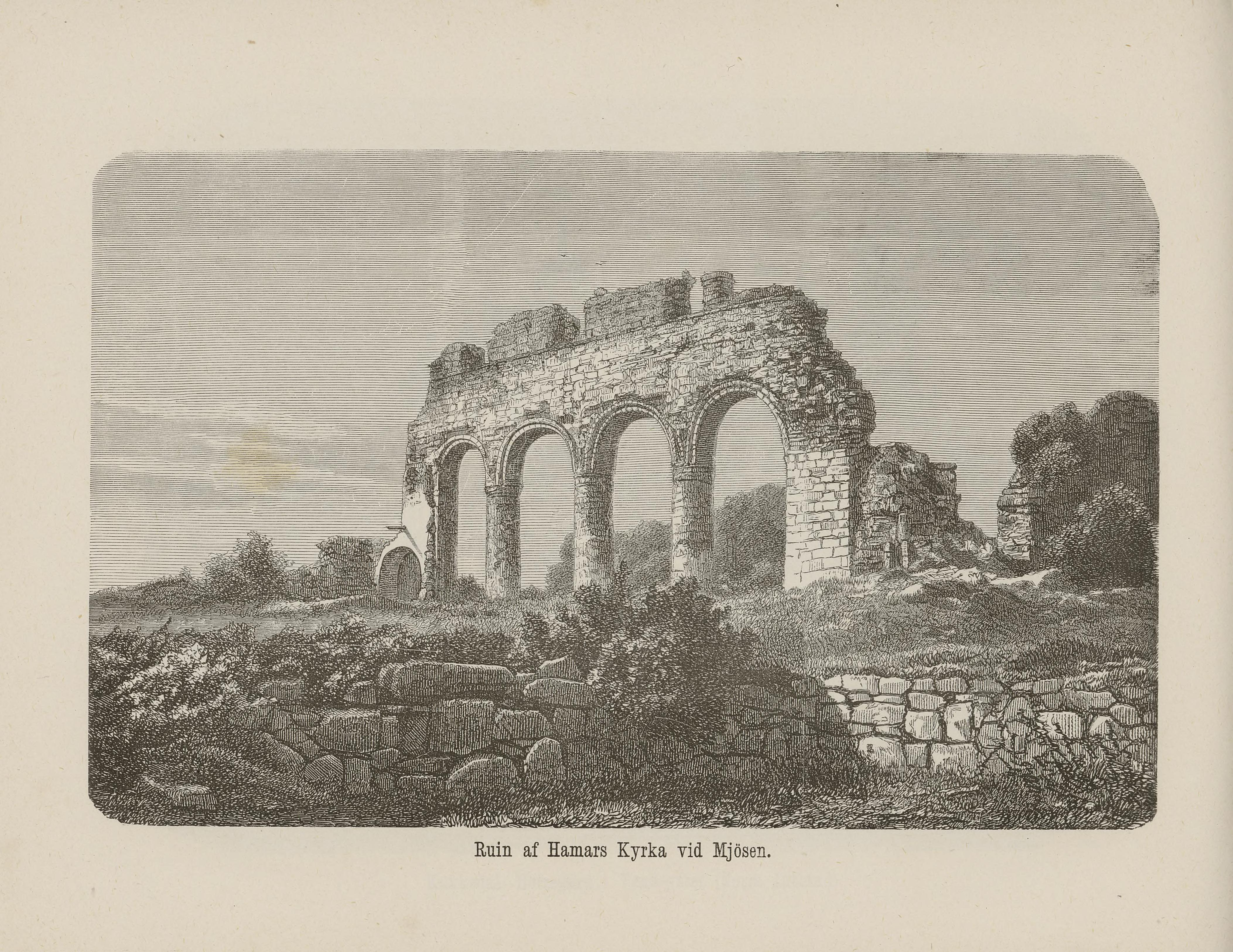 Illustrasjon hentet fra boken Nordiska taflor av ukjent forfatter og utgitt av Albert Bonnier (se, 1865)